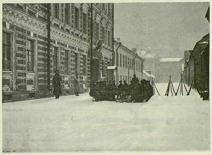 Часть роты Л.-Гв. Финляндского полка после разгона толпы у фабрики Шафа 9 января 1905 года. С моментальной фотографии.